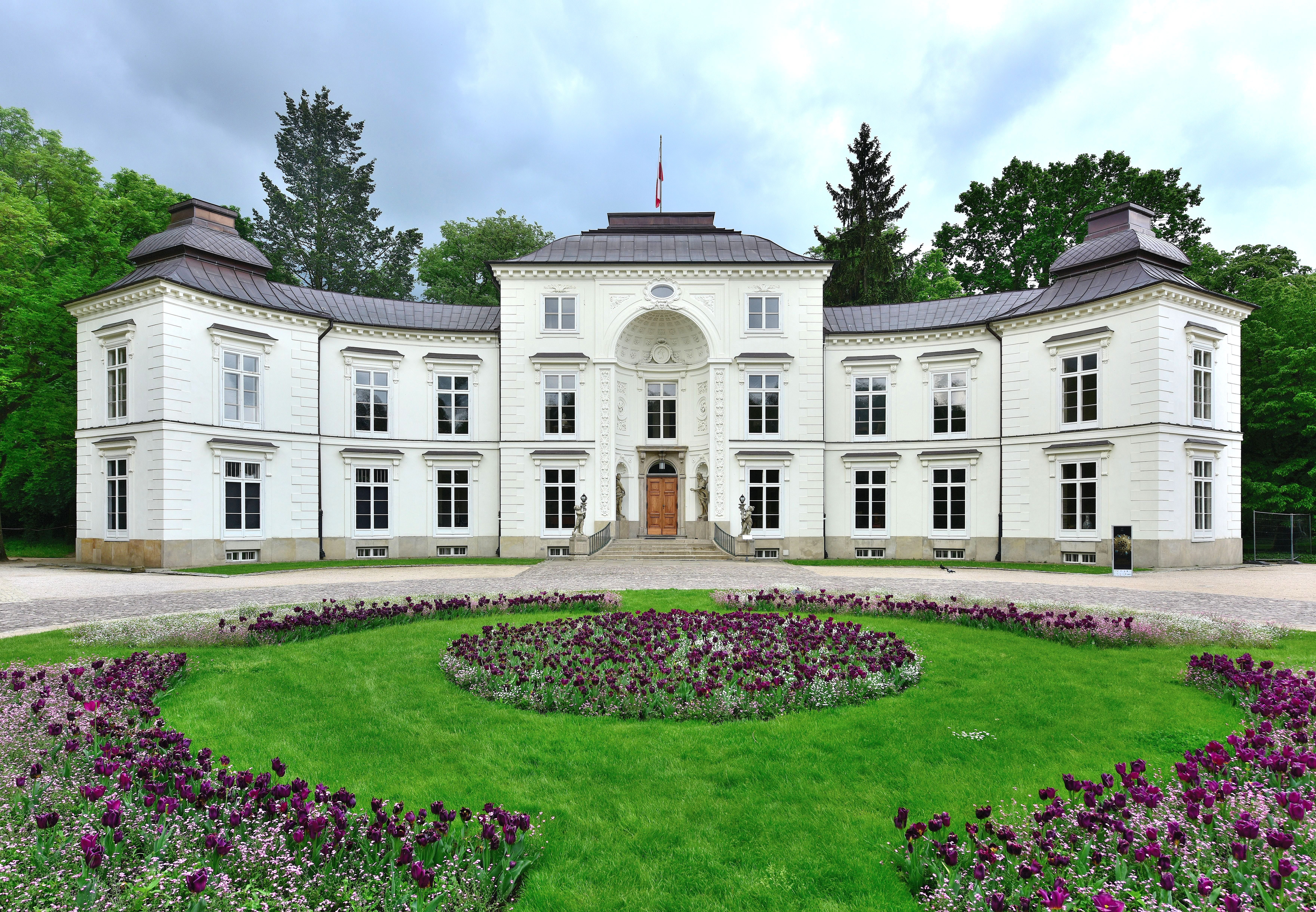 Pałac Myślewicki w Warszawie